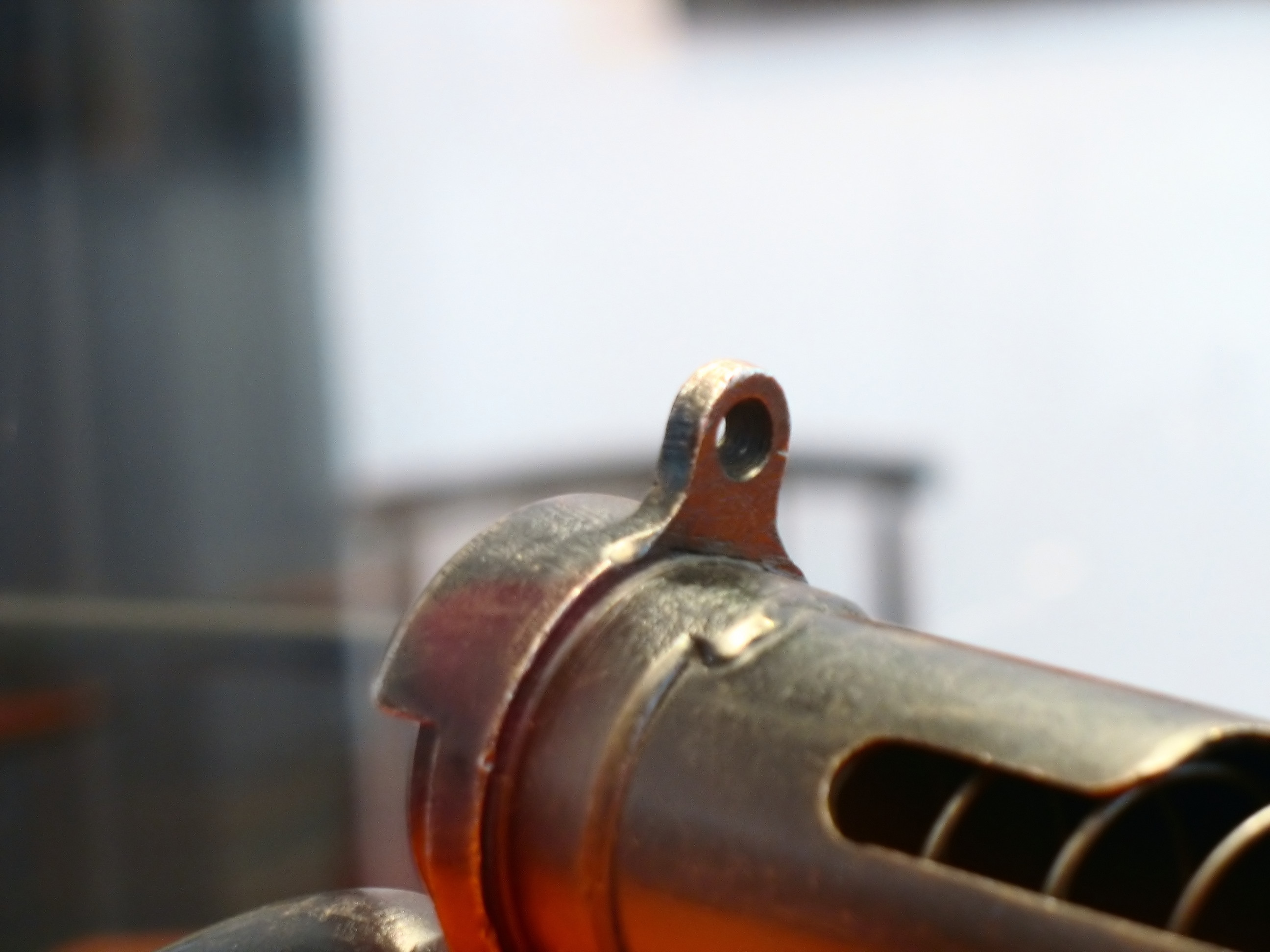 Celownik przeziernikowy pistoletu maszynowego Sten Mk II. Zdjęcie zrobione w Muzeum Górnictwa Węglowego, wystawa czasowa "Żołnierze wolności. I Dywizja Pancerna".